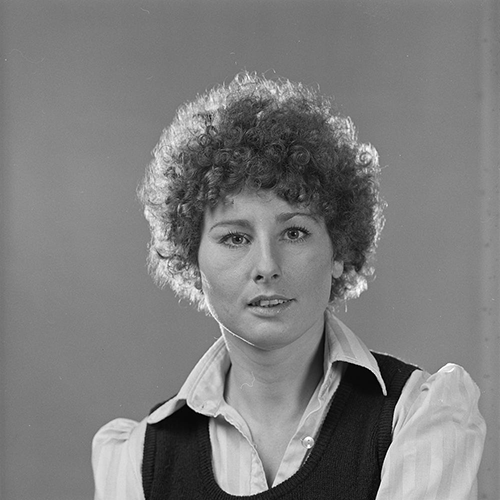 Ellis van den Brink in 1979